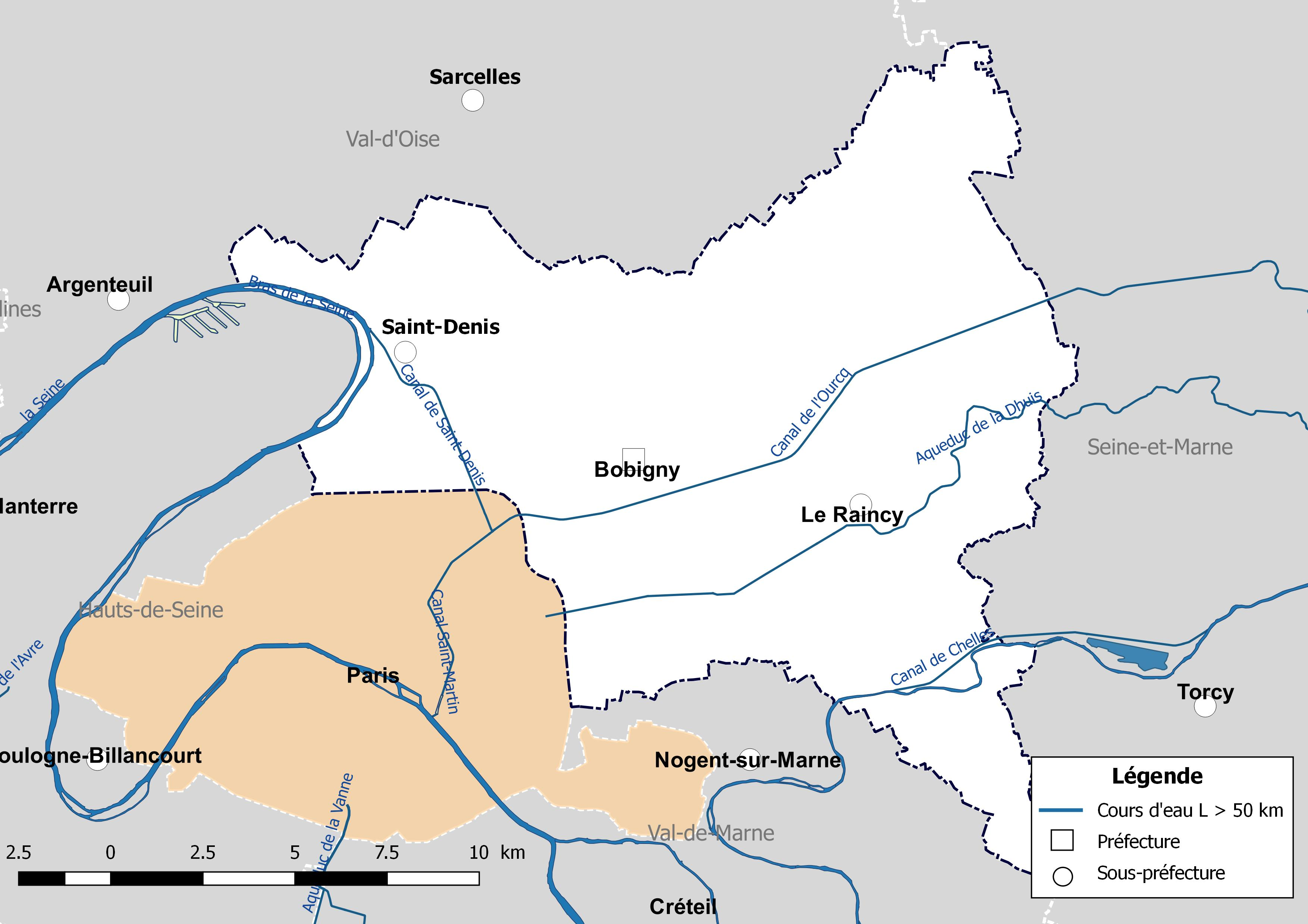 Carte des cours d'eau de longueur supérieure à 50 km drainant le département de la Seine-Saint-Denis (France).